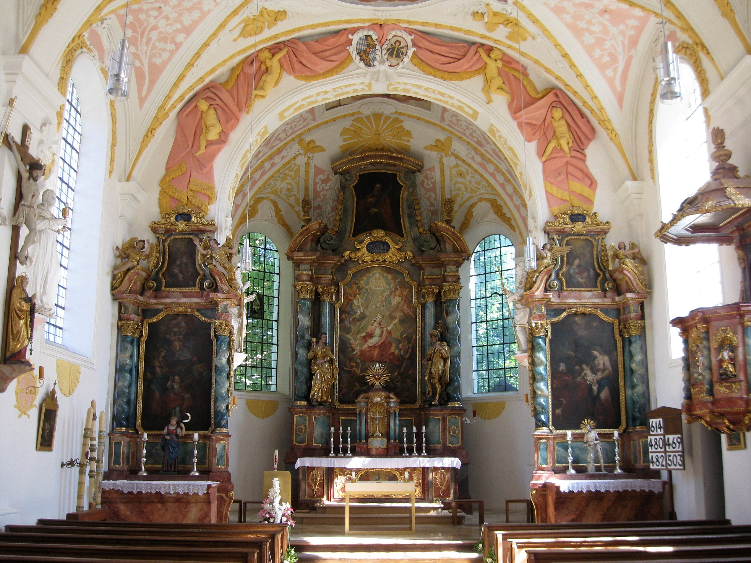 Plinganserstraße 1; Alte Sendlinger Kirche St. Margaret, 1711–12 von Wolfgang Zwerger. Innenraum